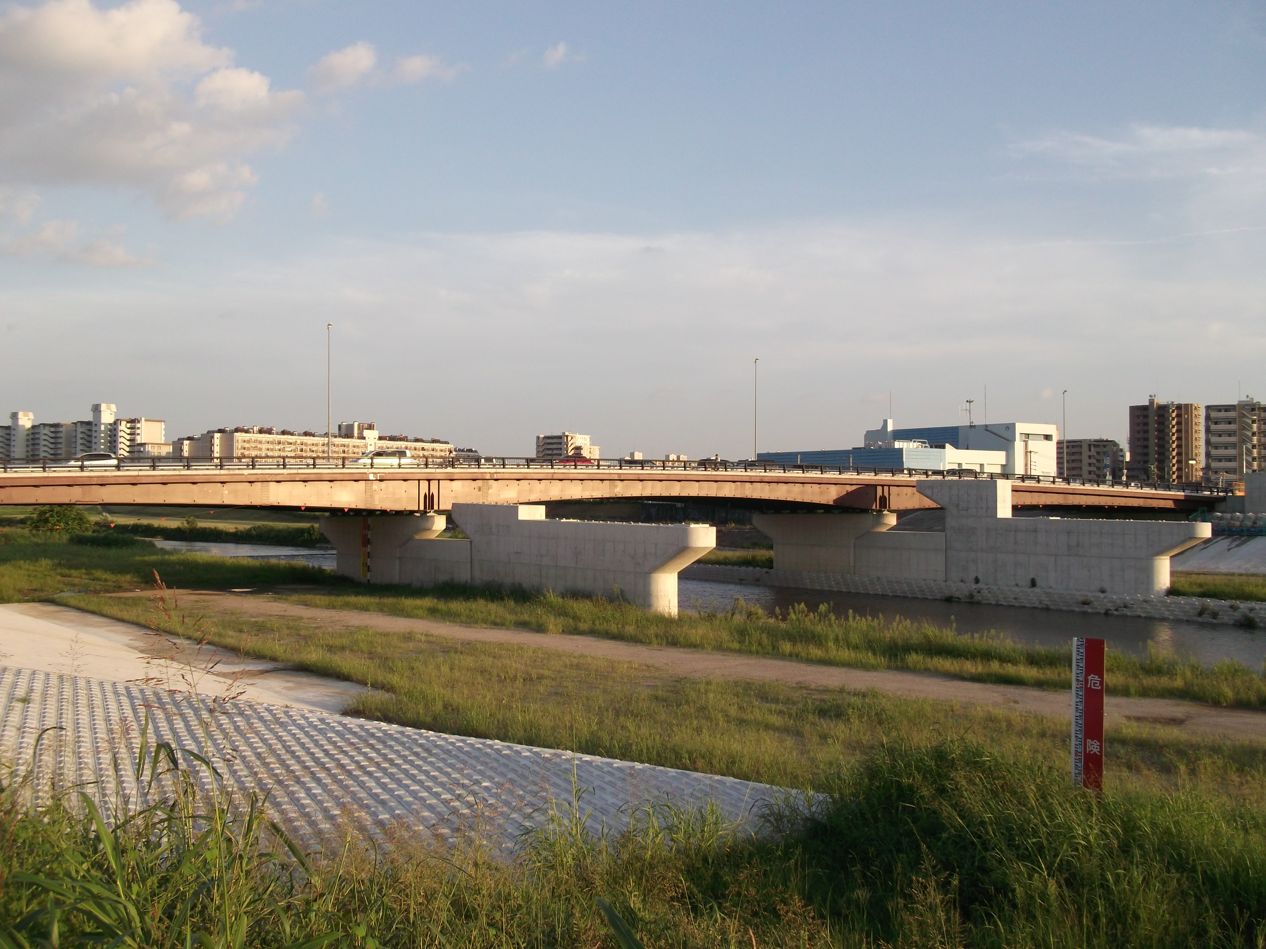 名古屋市北区・守山区の間を流れる矢田川に架かる三階橋を北西側堤防上から撮影。手前の橋脚は工事中。